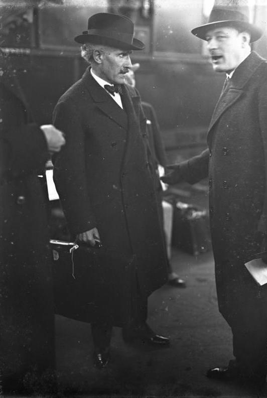 Faszisten ohrfeigen Toscanini! Der bekannte italienische Komponist und Dirigent der Mailänder Scale Toscanini, hatte sich bei einem Conzert in Bologna geweigert, die faszistische Hymne zu spielen und wurde daraufhin von einigen Faszisten offen geohrfeigt.